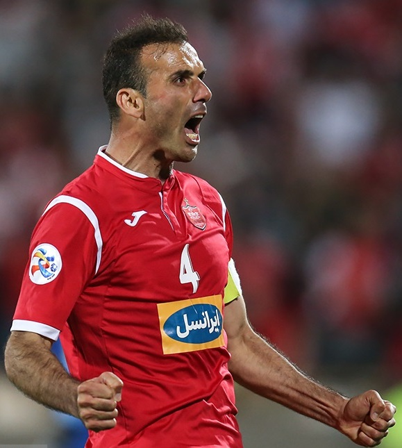 دیدار تیم‌های «پرسپولیس و الجزیره امارات» شامگاه دوشنبه ۲۴ اردیبهشت ۱۳۹۷